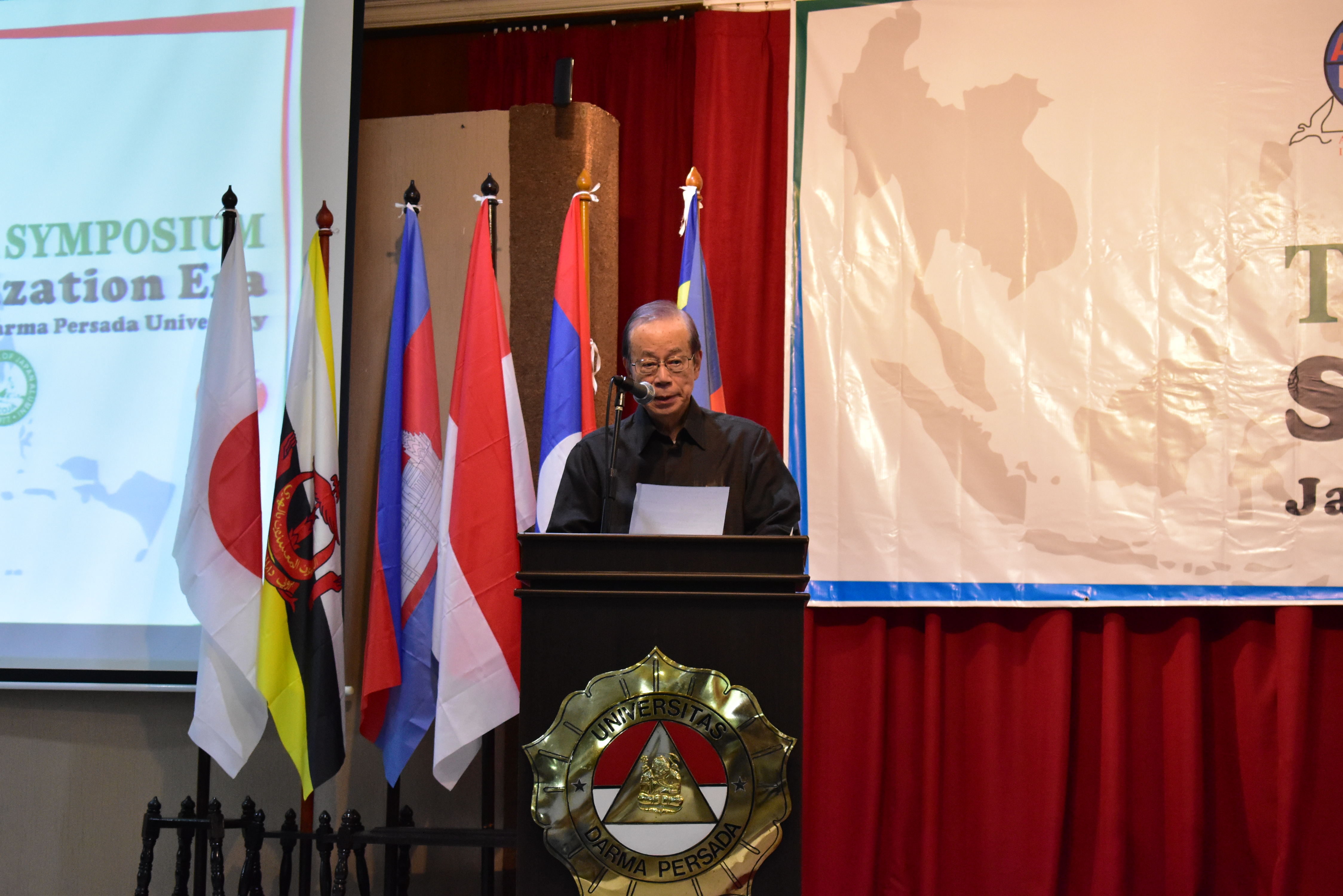 Mantan PM Jepang Mr. Yasuo Fukuda dalam Simposium Internasional ASJA ASCOJA 2018 di Universitas Darma Persada